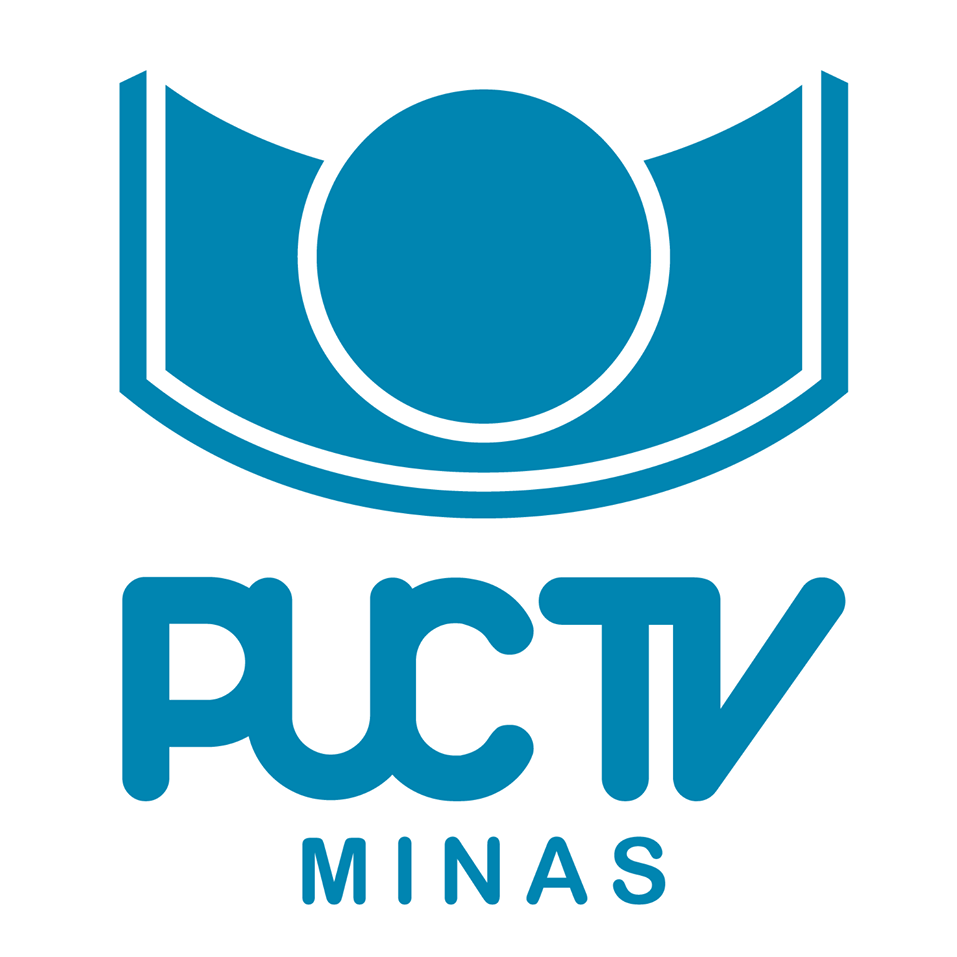 Logo da PUC TV Minas, TV Universitária de Belo Horizonte.